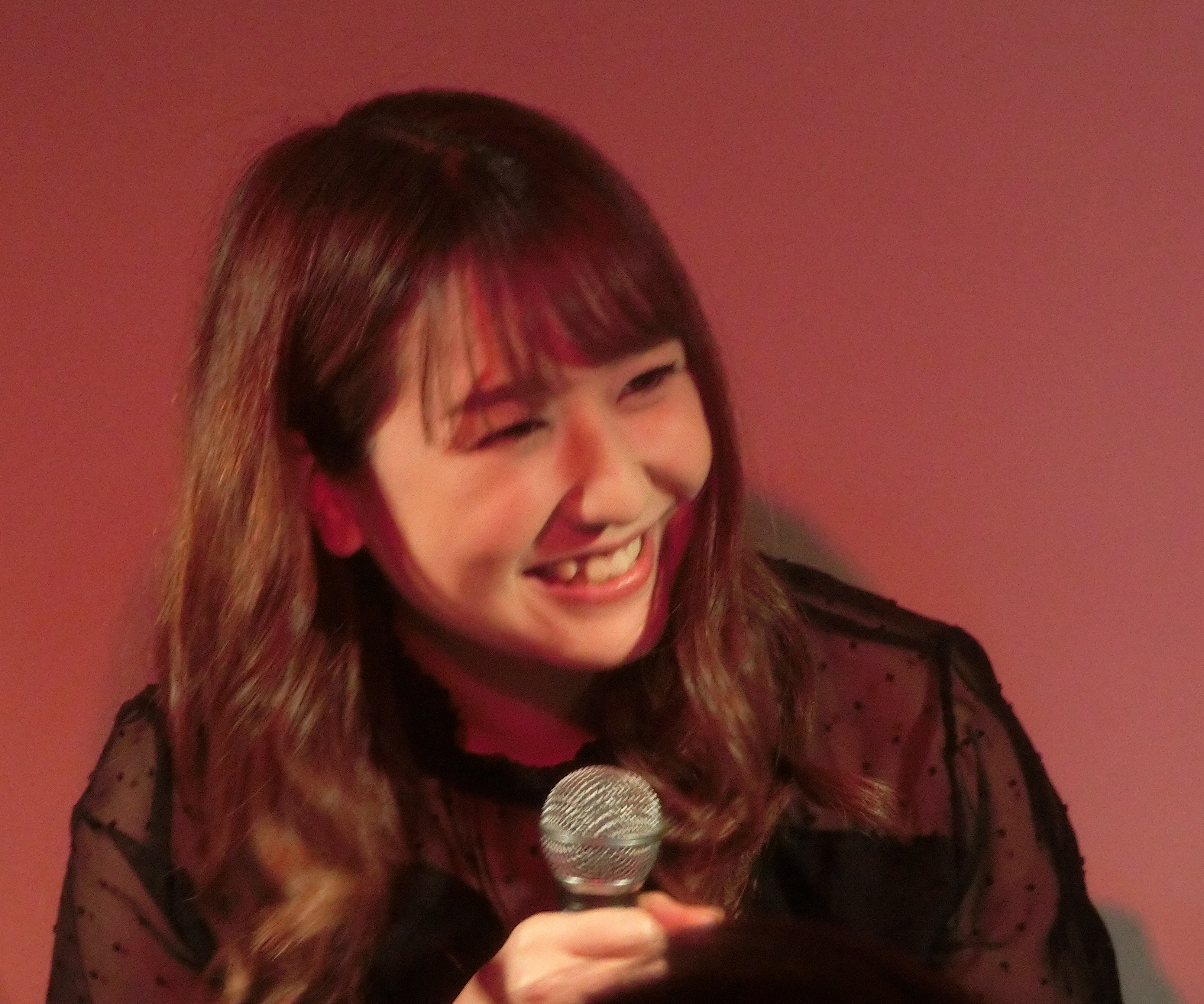 2019年10月6日、Adult video supporting actress prize